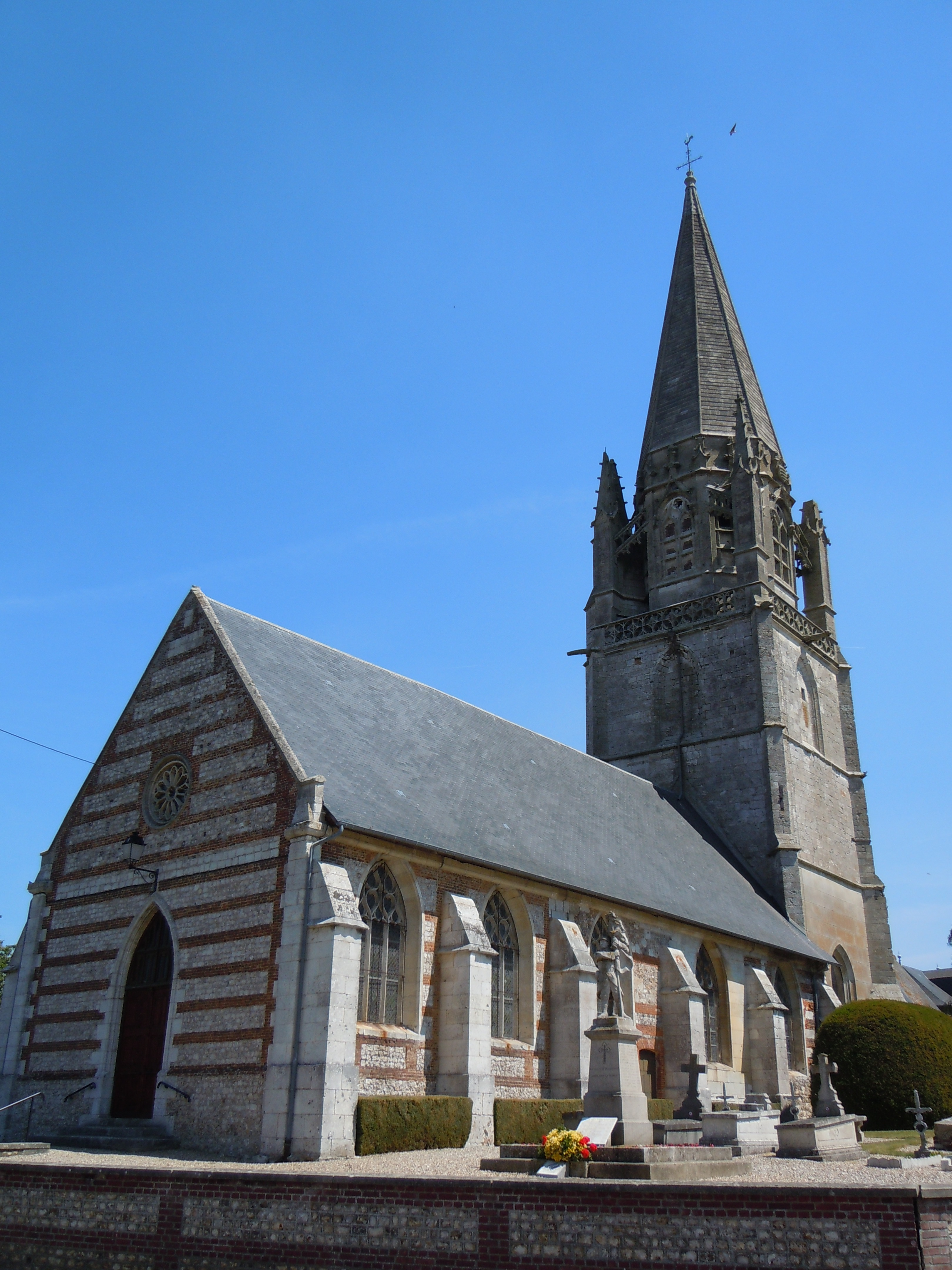 Valliquerville - ( Seine-Maritime) - Eglise Notre-Dame